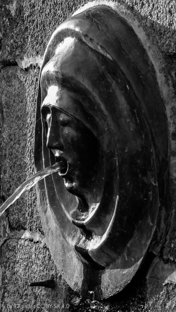 Néréide en bronze sculptée par Jean Denis (1894-1979).